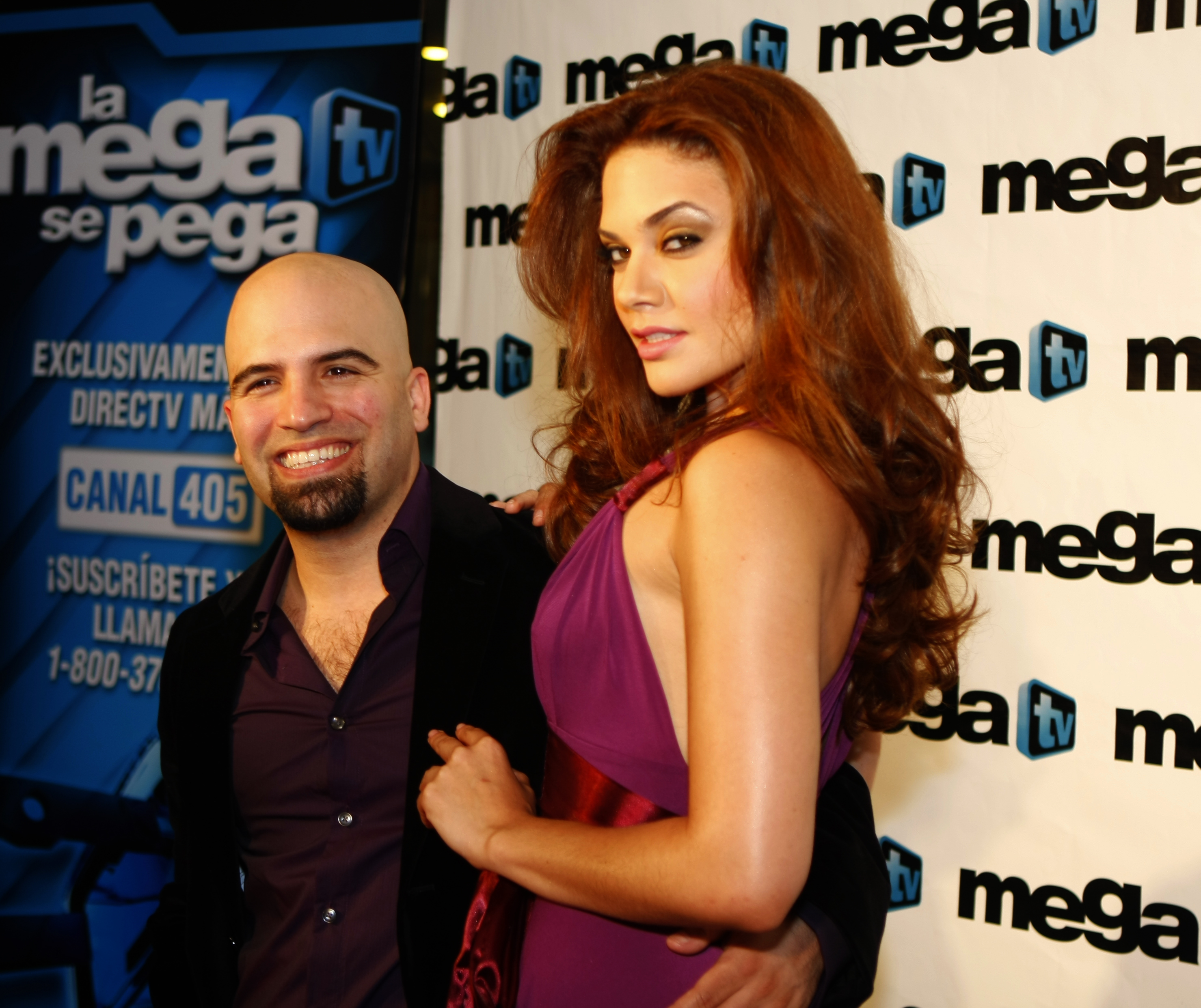 Agustín Fernández y su ex pareja Angélica Celaya